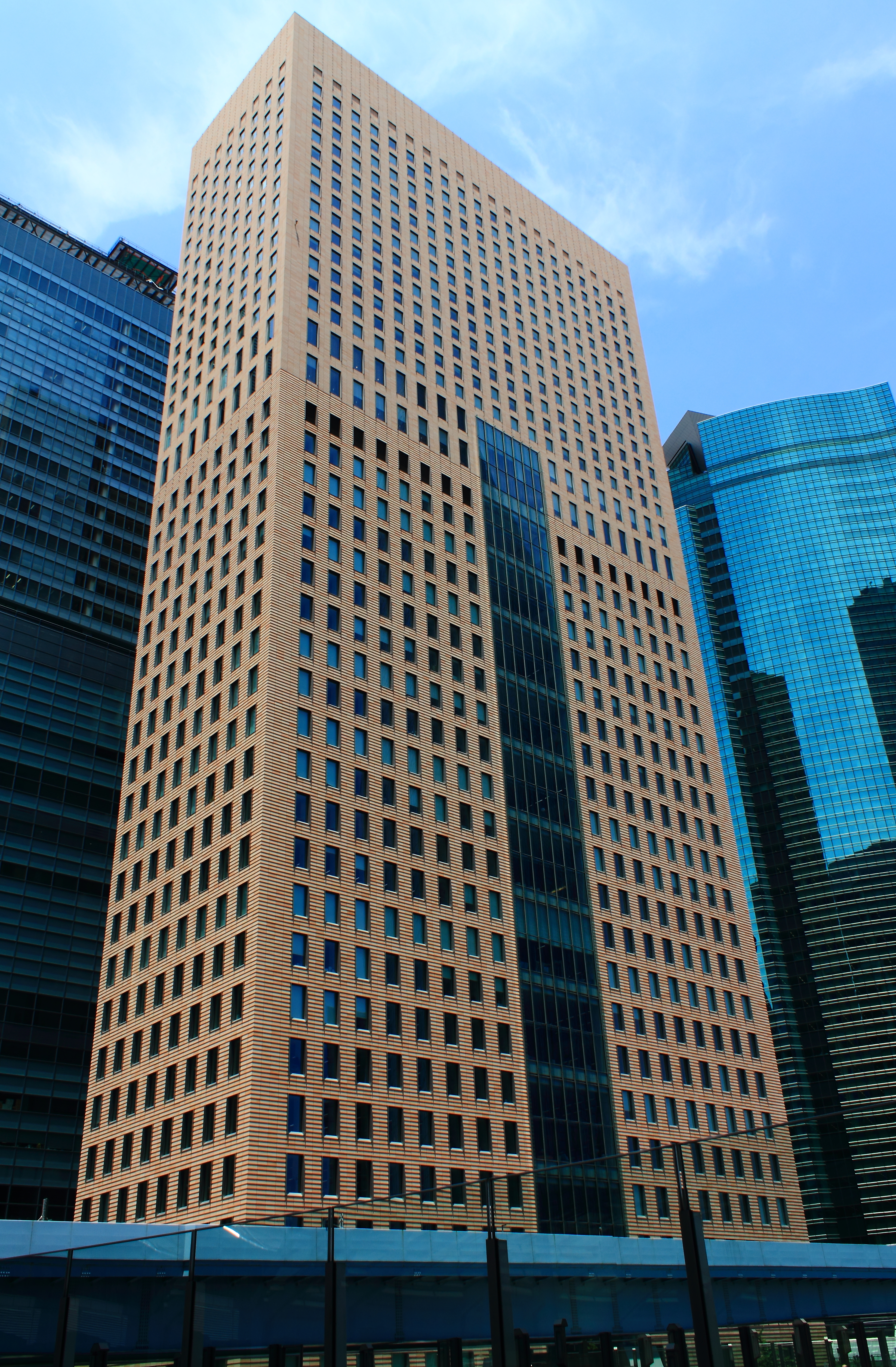 汐留タワー（東京都港区）